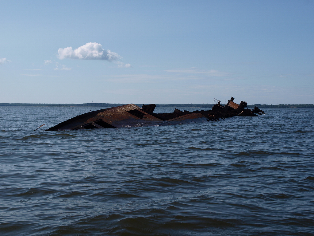 Остов судна Вацлав Воровский